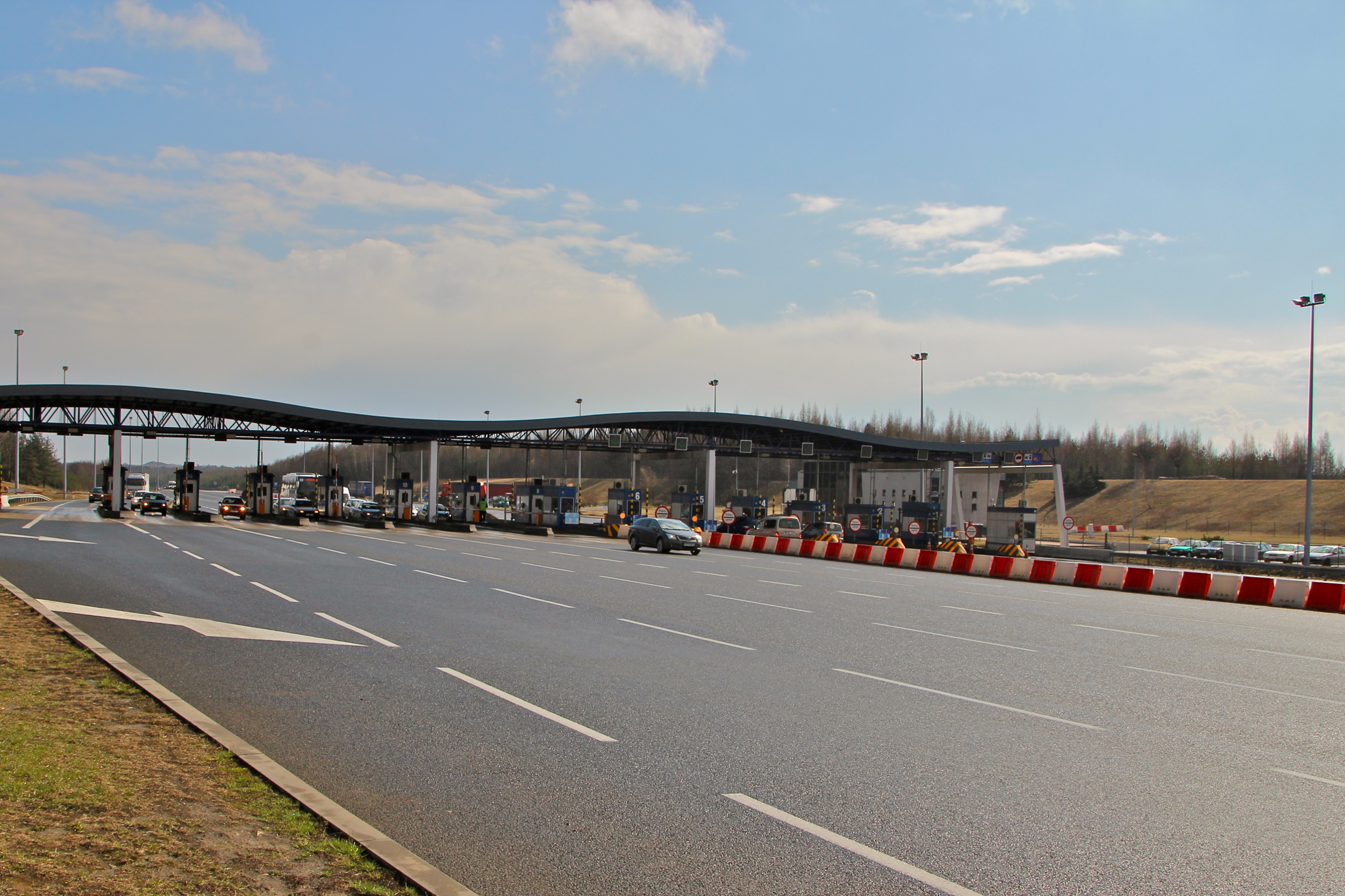 Punkt poboru opłat Mysłowice-Brzęczkowice na autostradzie A4.